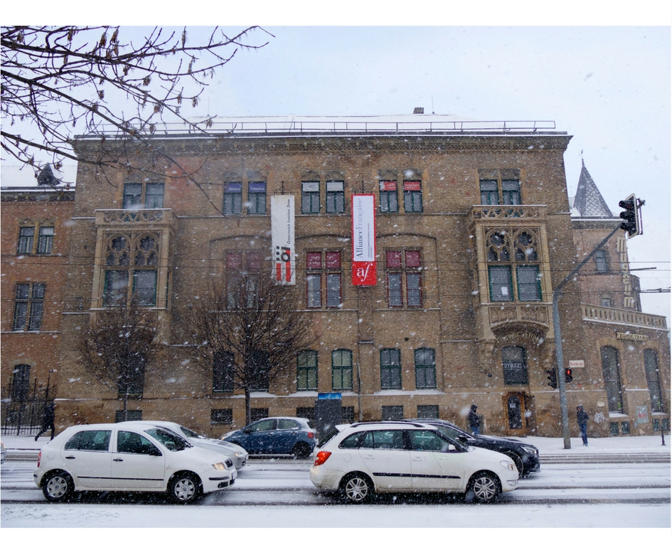 The structure, Moravské nám. 690/15, Brno-Veveří.